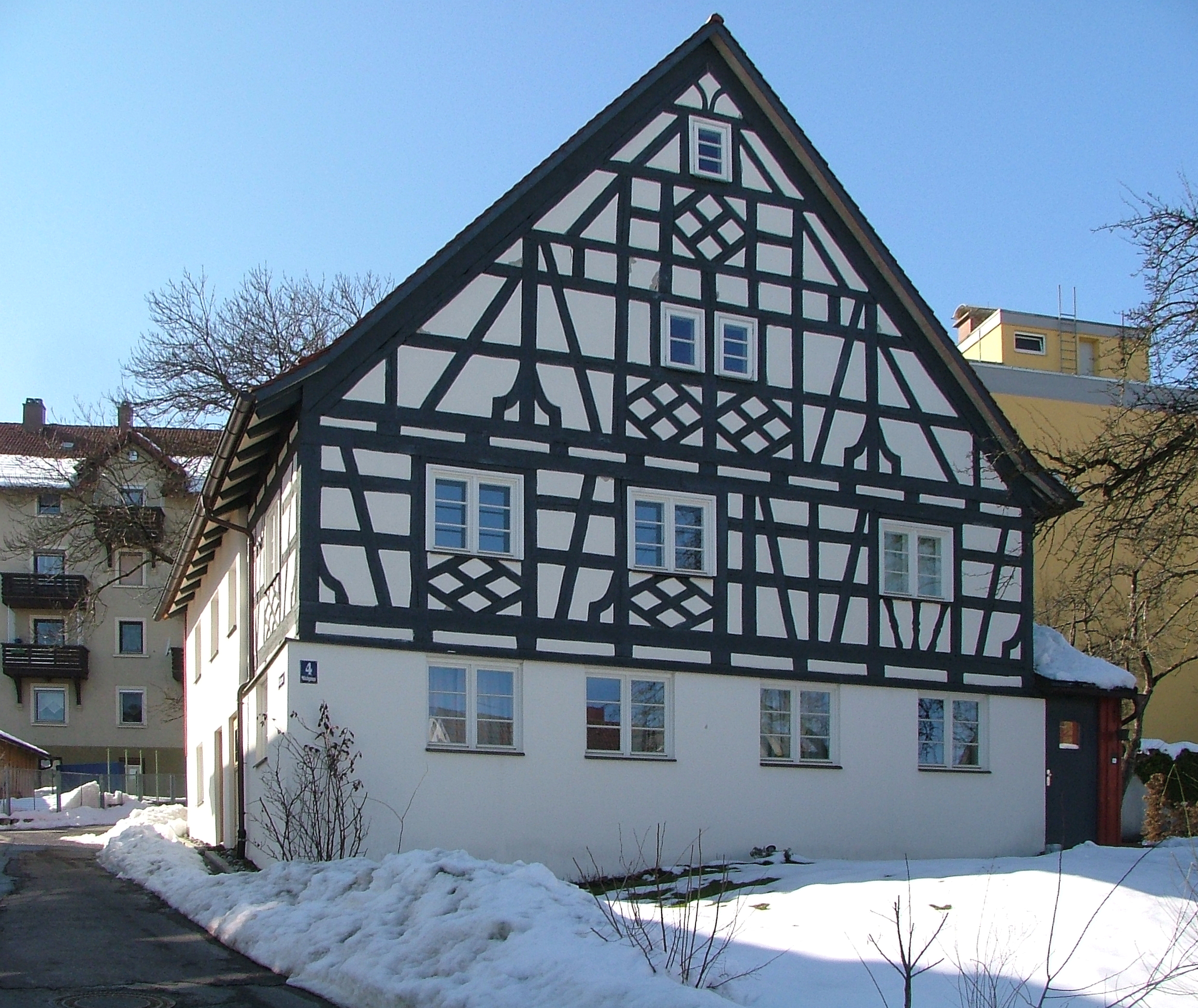 Fachwerk